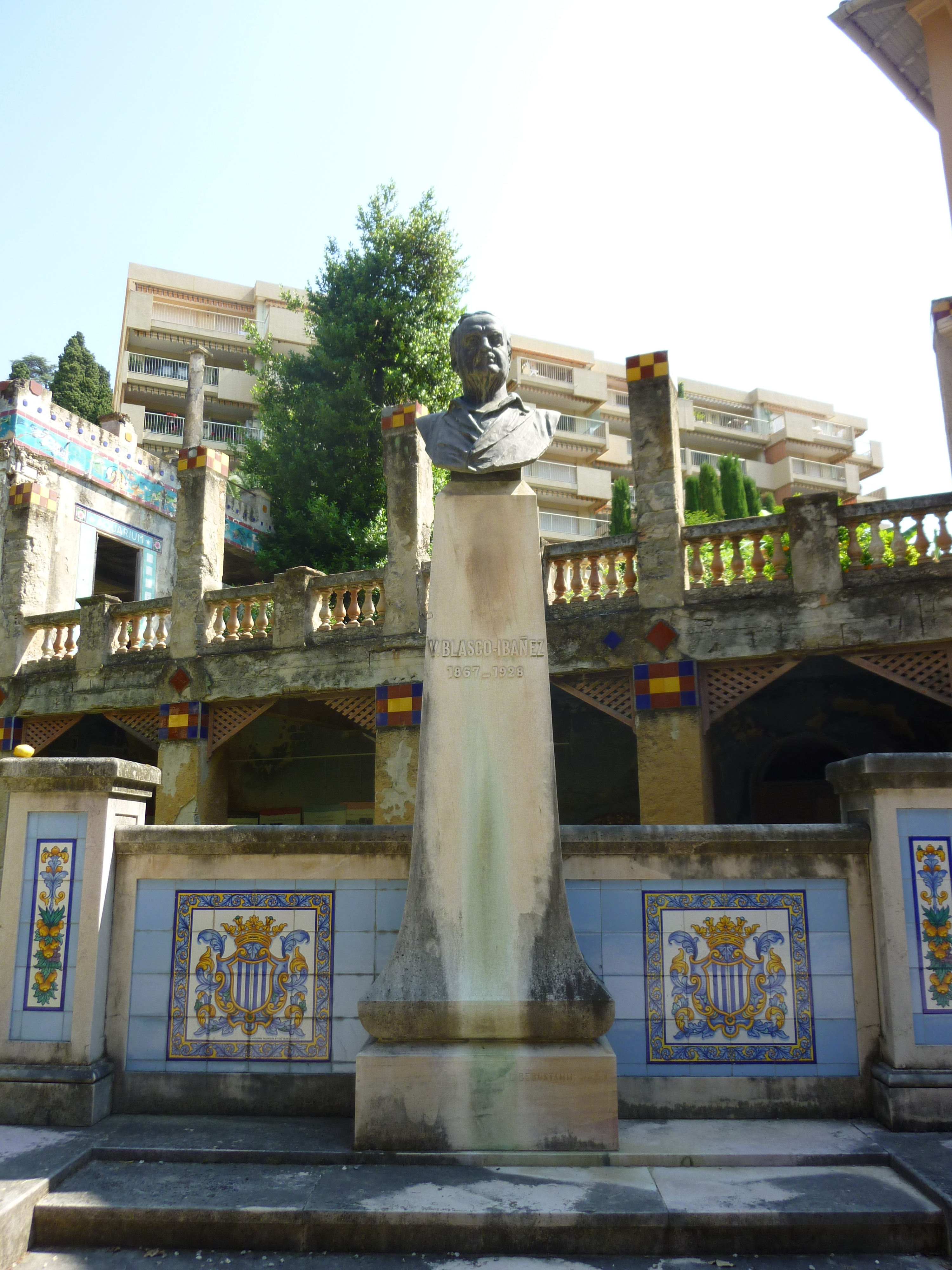 Monument à Vicente Blasco Ibáñez par Léopold Bernstamm, Jardin de Fontana Rosa, Menton, Alpes-Maritimes, France. .